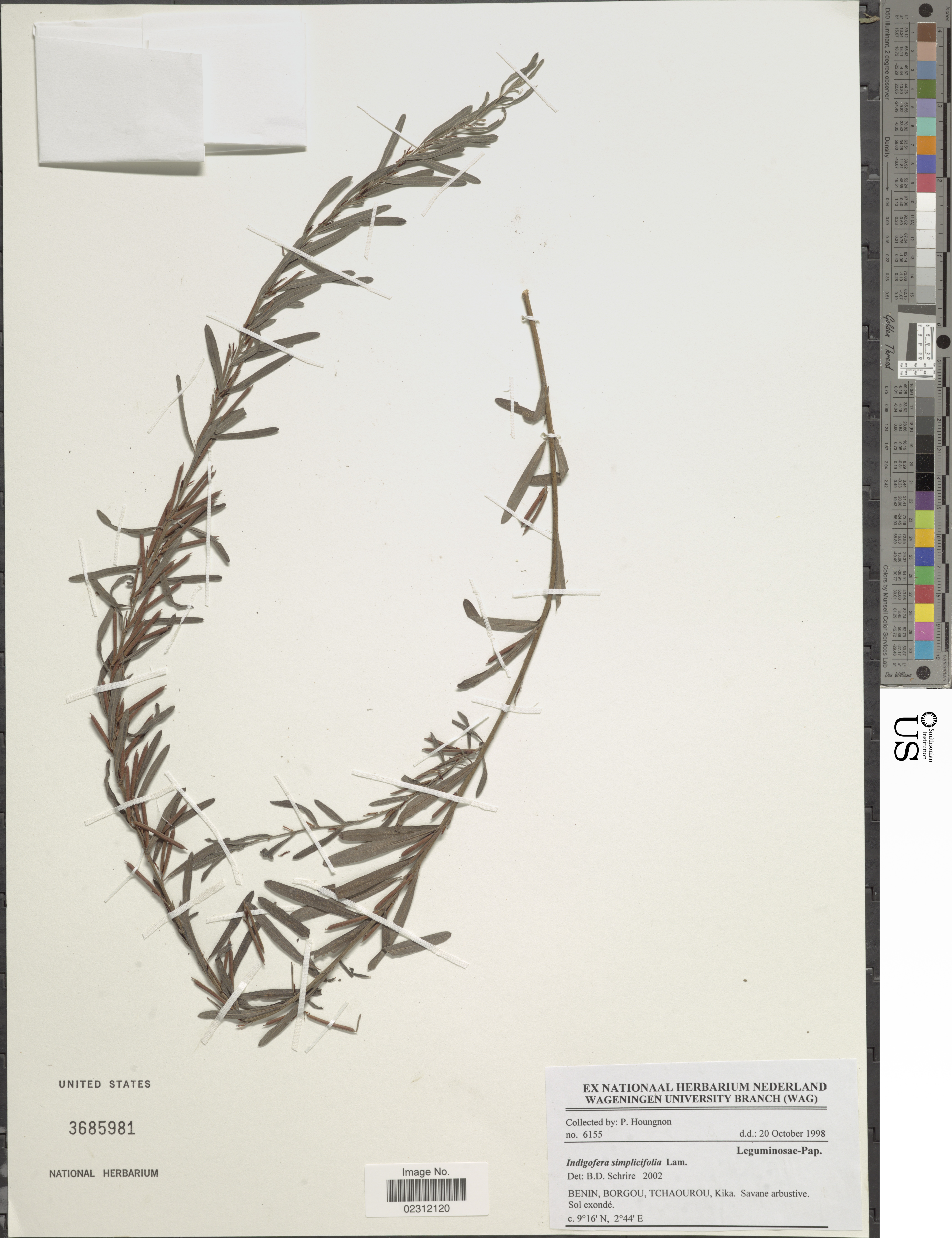 Indigofera simplicifolia Lam. Object Details Biogeographical Region 22 - West Tropical Africa Collector P. Houngnon Record Last Modified 3 Jan 2018 Specimen Count 1 Collection Date 20 Oct 1998 Barcode 02312120 USNM Number 3685981 Place Tchaourou, Kika, Borgou, Benin, Africa Published Name Indigofera simplicifolia Lam. Taxonomy Plantae Dicotyledonae Rosales Fabaceae Faboideae NMNH - Botany Dept. Record ID nmnhbotany_13323257 Usage of Metadata (Object Detail Text) CC0 GUID (Link to Original Record)